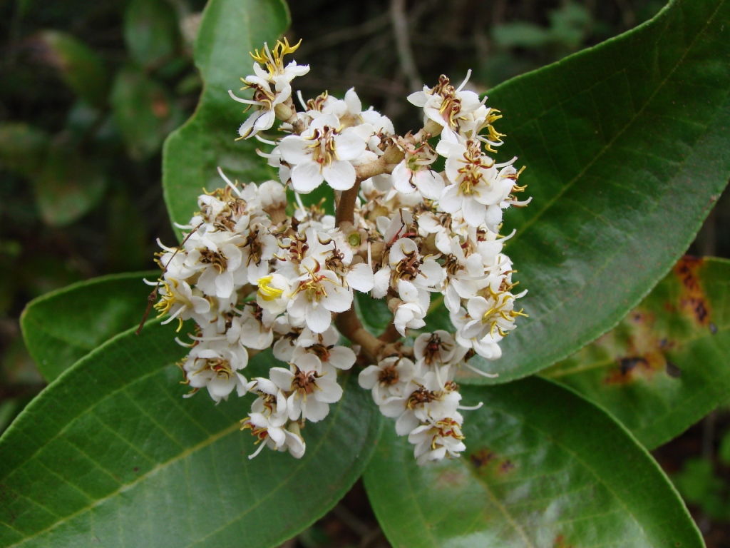 Miconia fallax DC. - MELASTOMATACEAE - Jardim Botânico de Brasília - Distrito Federal - Brasil.